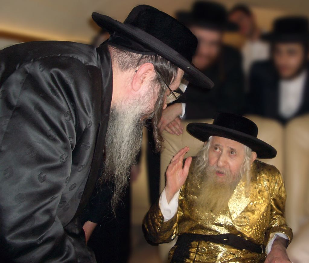 האדמו"ר רבי משולם פייש עם בנו האדמו"ר רבי אלימלך